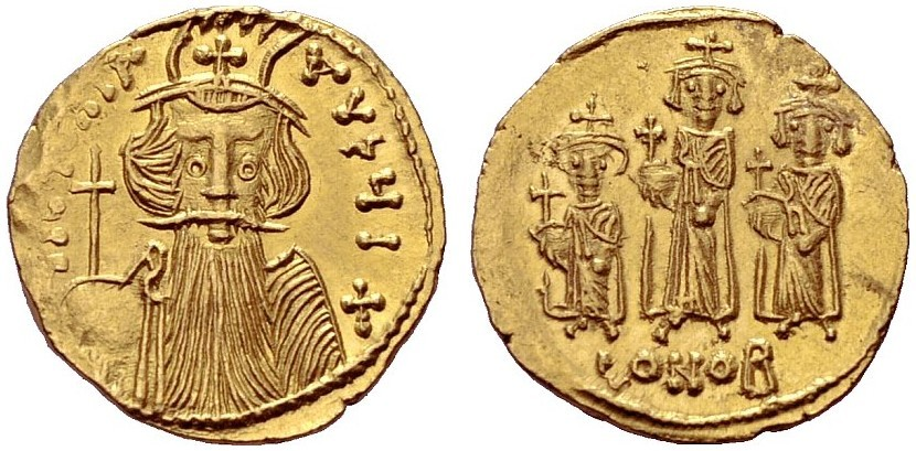 Constans II Solidus aus dem Jahr 667